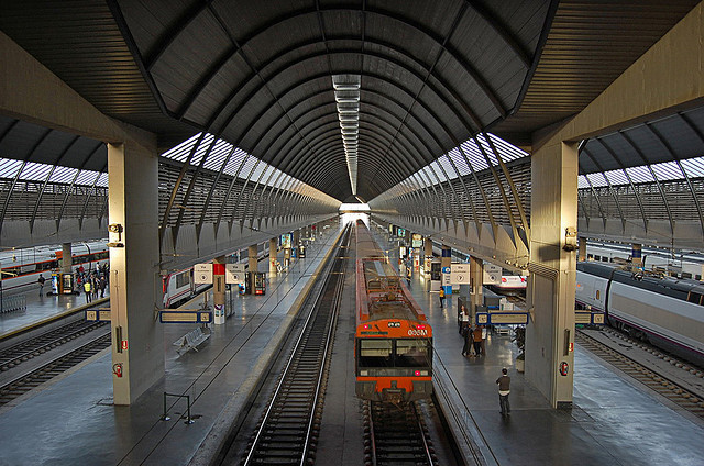 Varios trenes en la estación de San Justa Thank you Richard!) Yeap. Again.